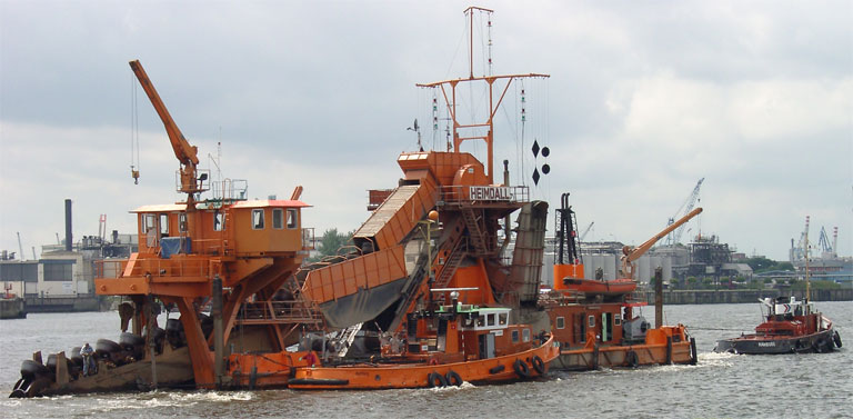 Motiv: Baggerschiff Heimdall geschleppt von einem Hafenschlepper. Aufnahmedaten: 7 mm (90,8 mm entsprechend 35-mm-Kleinbildformat) Blendeneinstellung: 4,0 Belichtungszeit: 1/990 Sek. Blitz: — Aufnahmeort: Hamburg, auf der Norderelbe zwischen Grasbrook und Kleinem Grasbrook. Bildname: Baggerschiff_01_KMJ.jpg Bildgröße: 768 Pixel × 377 Pixel (69.183 Bytes) Stichworte: Baggerschiff, Heimdall, Elbvertiefung, Elbe, Hafen, Hafenschlepper, Hamburg